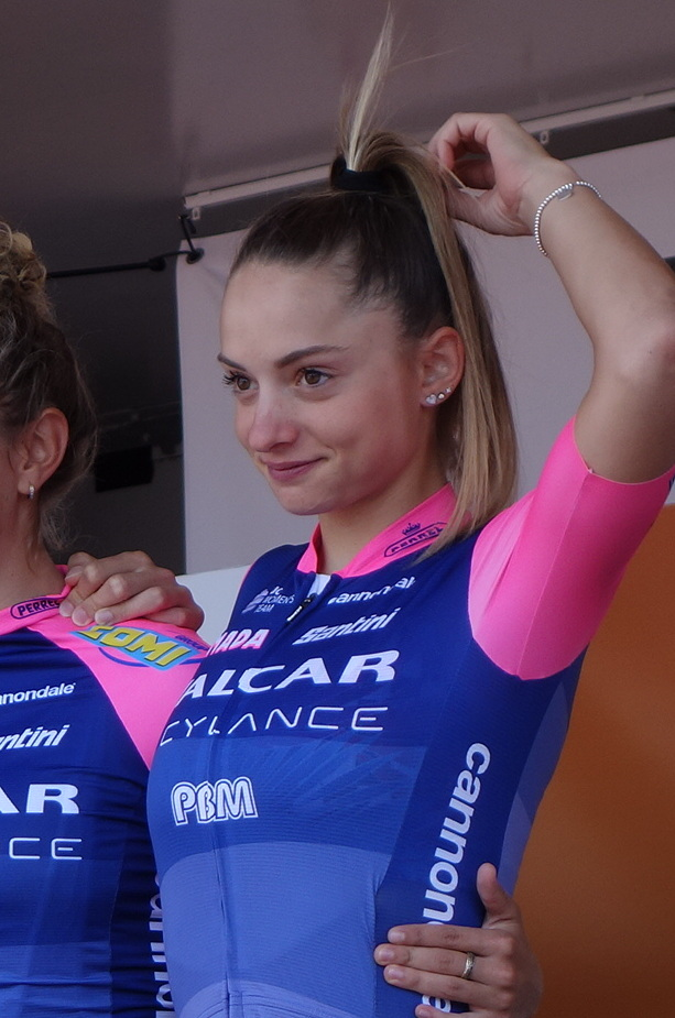 Chiara Consonni (Valcar-Cylance) bij de start van de eerste etappe van Stramproy naar Weert in de Boels Ladies Tour 2019